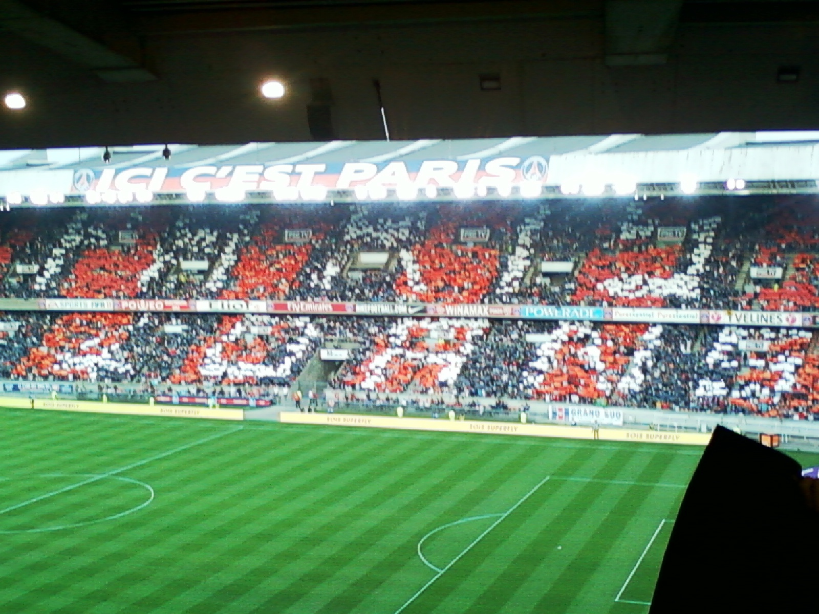 Tifo "Paris 40 ans" lors du match Paris SG-Lille OSC du 21 mai 2011 au Parc des Princes